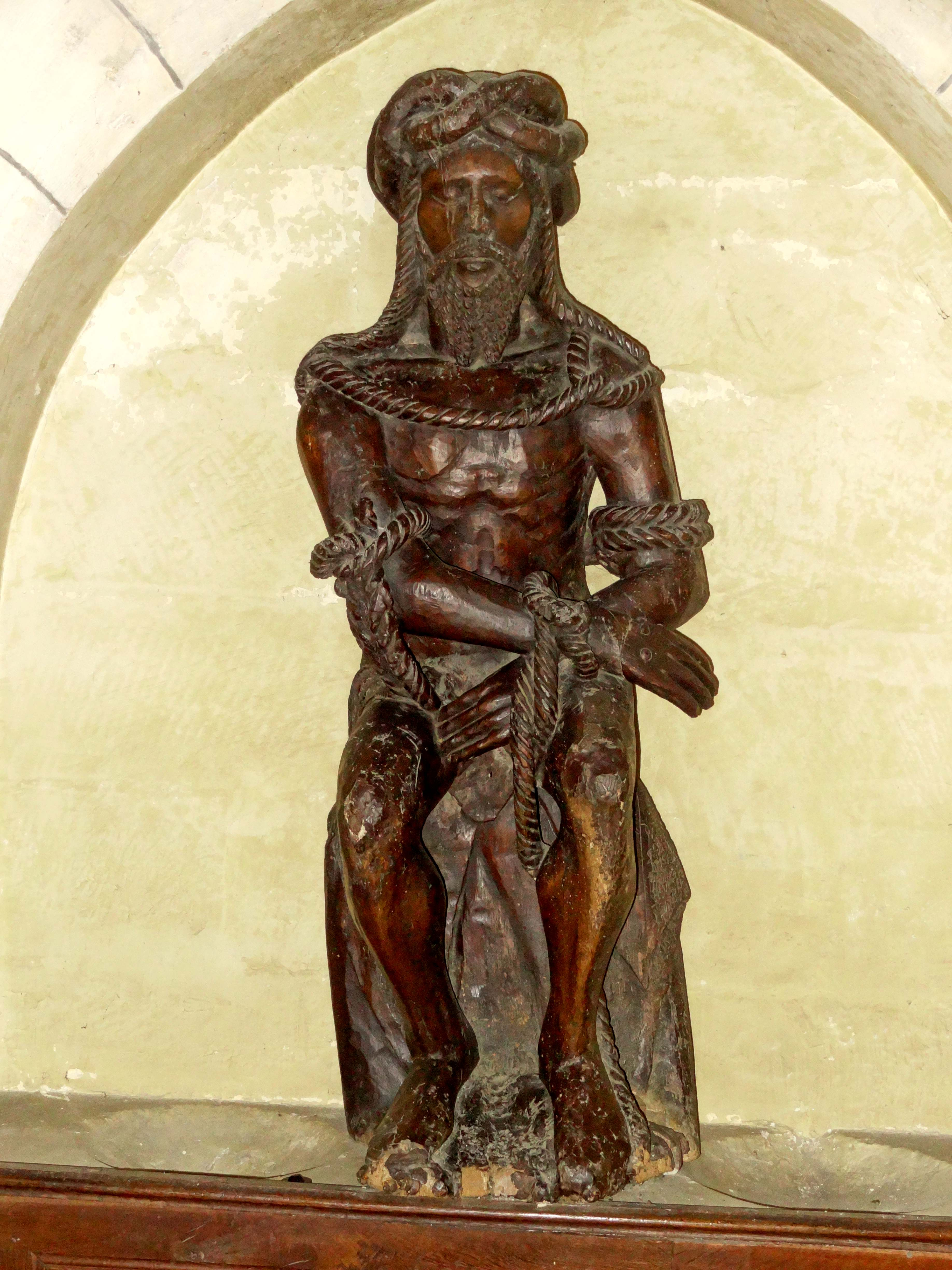 Mobilier de l'église - voir titre.